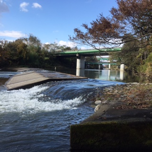 四ッ谷用水 取水堰